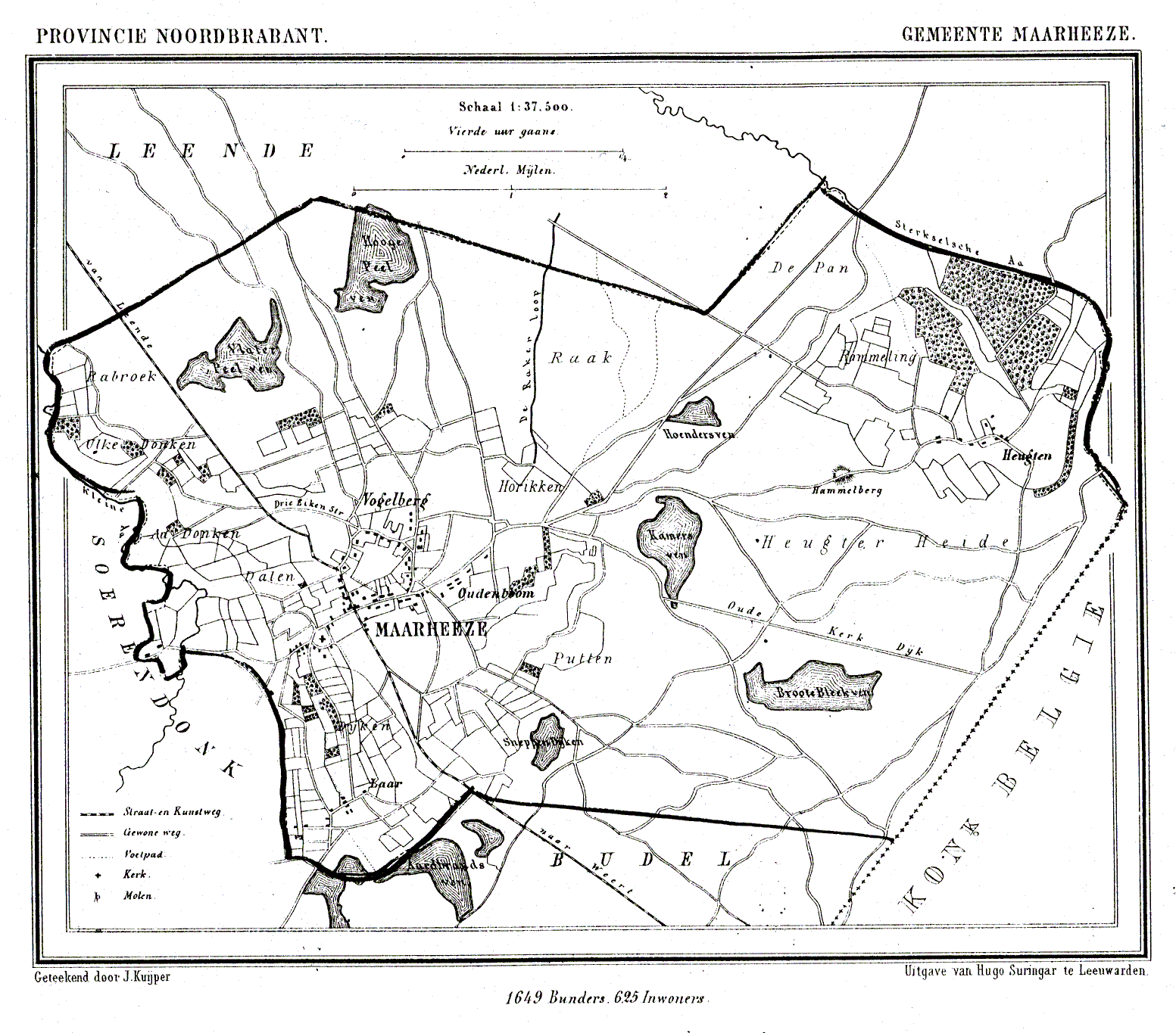 Nederland, Noord-Brabant, Gemeente Maarheeze